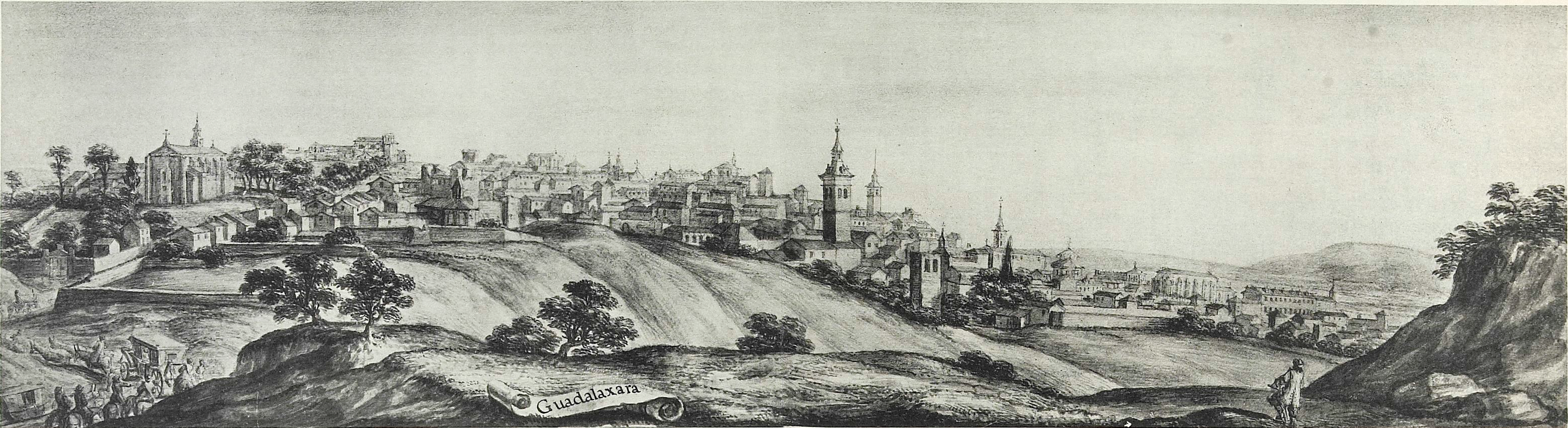 Vista panorámica de Guadalajara (España) en 1668, según acuarela de Pier Maria Baldi (Florencia, 1630 − 1686).